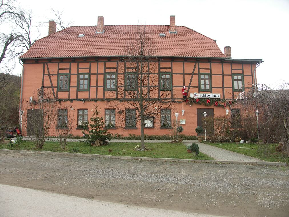 Ditfurt, Restaurant Schuetzenhaus